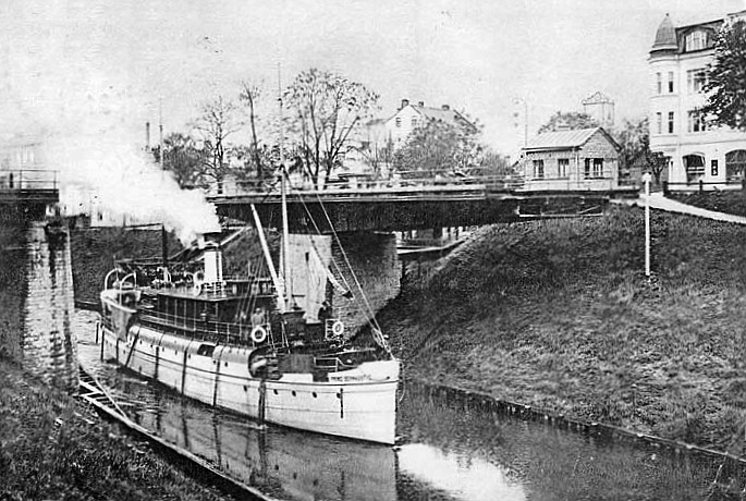 Gamla svängbron, Södertälje existerade mellan 1910 och 1924 och flyttades 1926 till Stäket